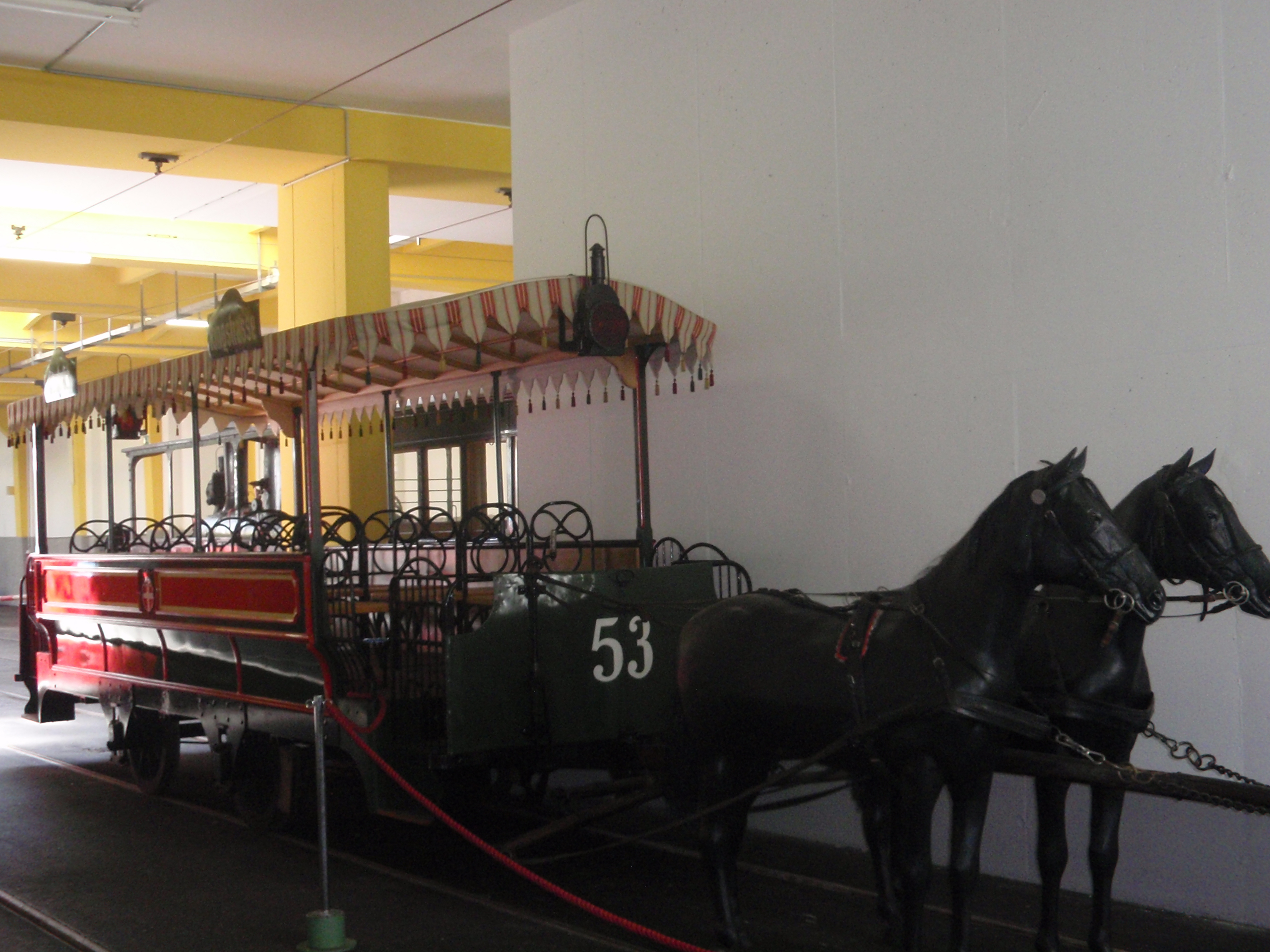 Wiener Straßenbahnmuseum Pferdebahn-Sommerwagen Nr. 53, gebaut 1868 von einer Werkstatt in der Taborstraße in Wien Leopoldstadt, 21 Sitzplätze, 1902 für den elektrischen Betrieb adaptiert, 1948 zum Güterwagen umgebaut, zuletzt Mistwagen, 1979 vom WTM übernommen